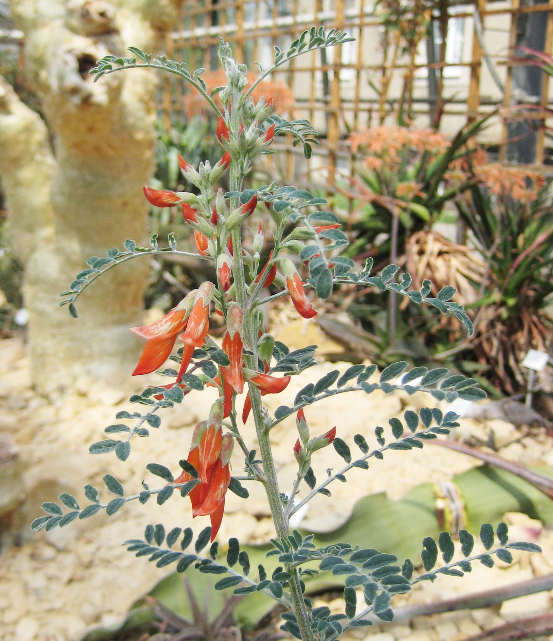 Sutherlandia frutescens im Botanischen Garten Dresden